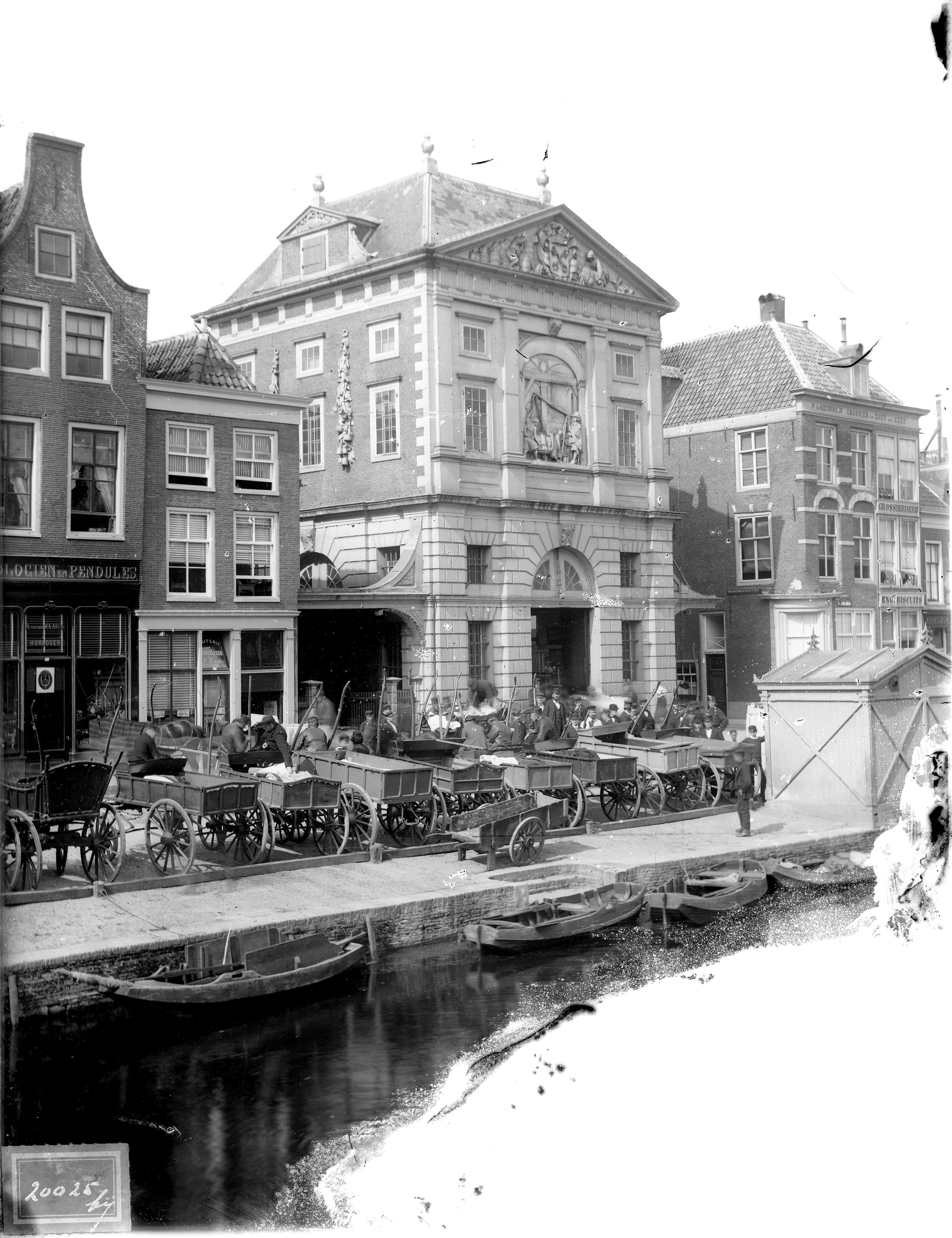 Gezicht op De Waag aan de Aalmarkt in Leiden. Op de voorgrond karren met wachtende mannen. Tekst: A van der Waag Az / Horloger / Horlocien en Pendules.